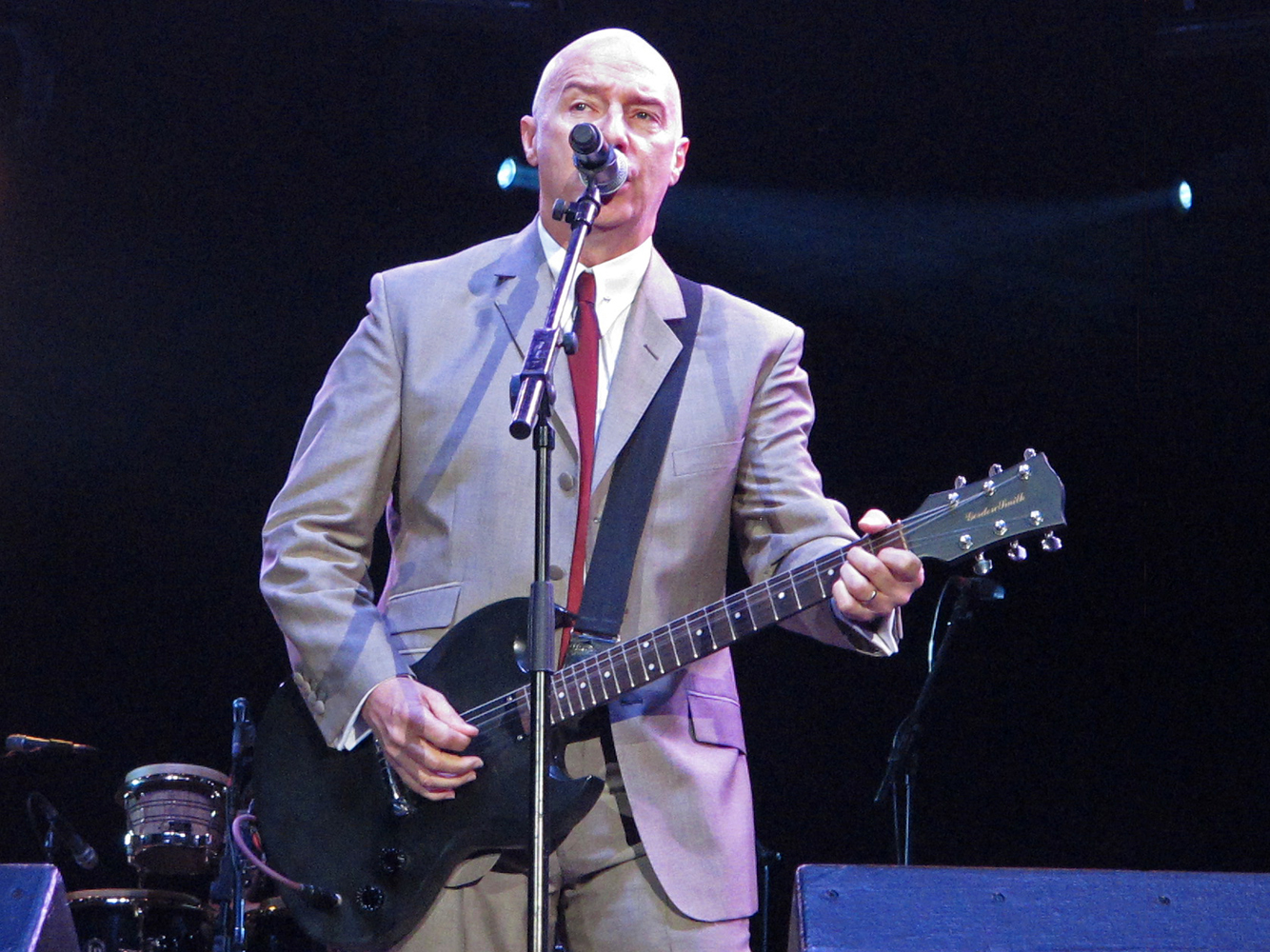 Midge Ure